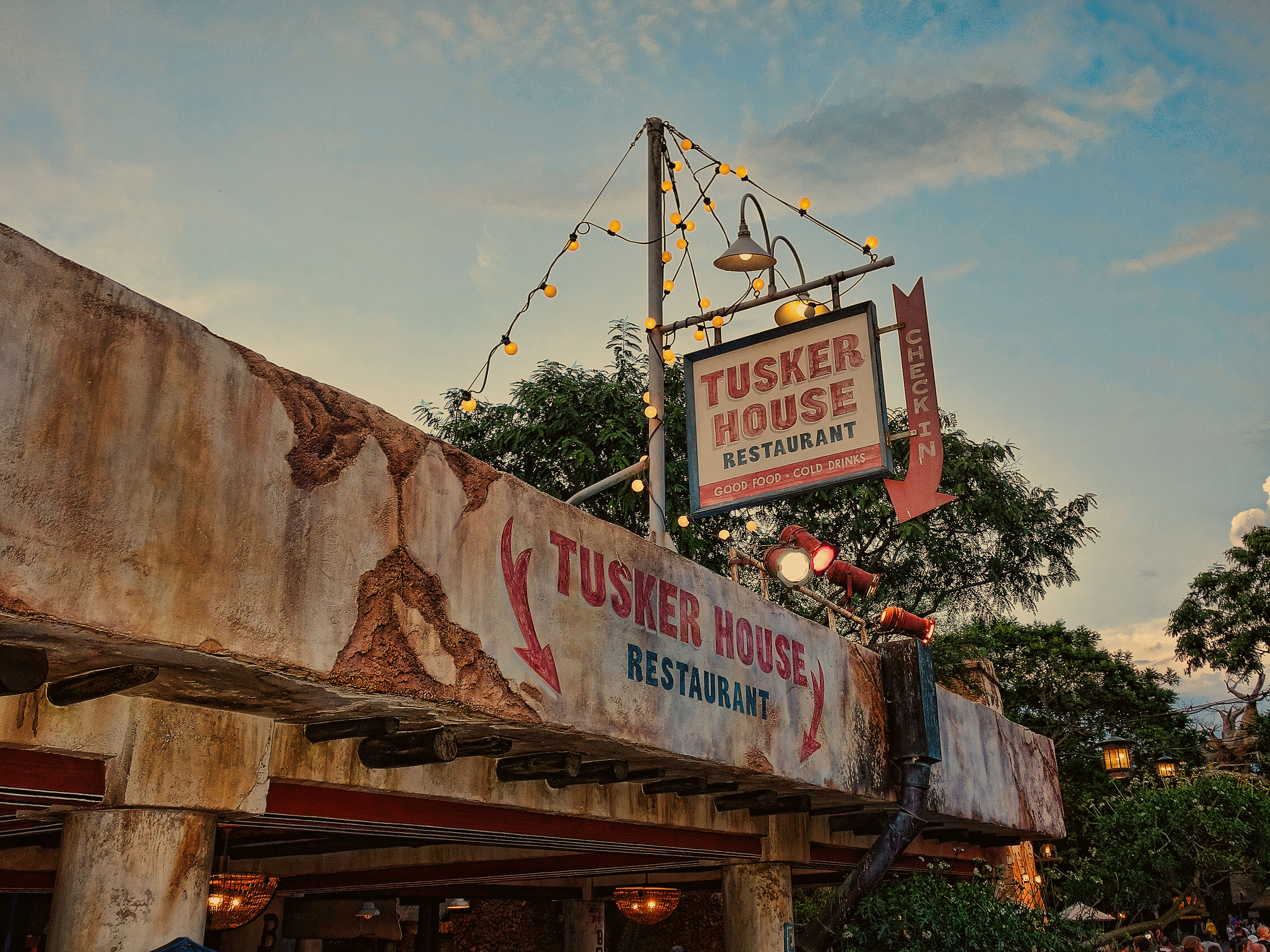 Disney Animal Kingdom